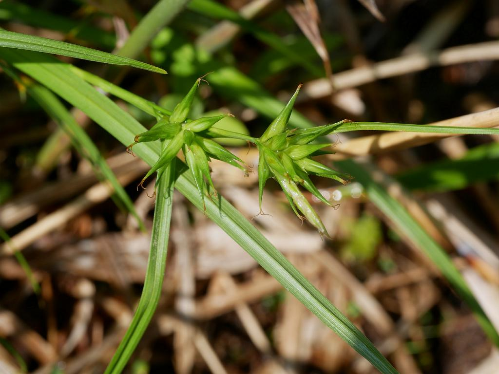 2019/06/20 群馬県：Gunma Pref. Japan